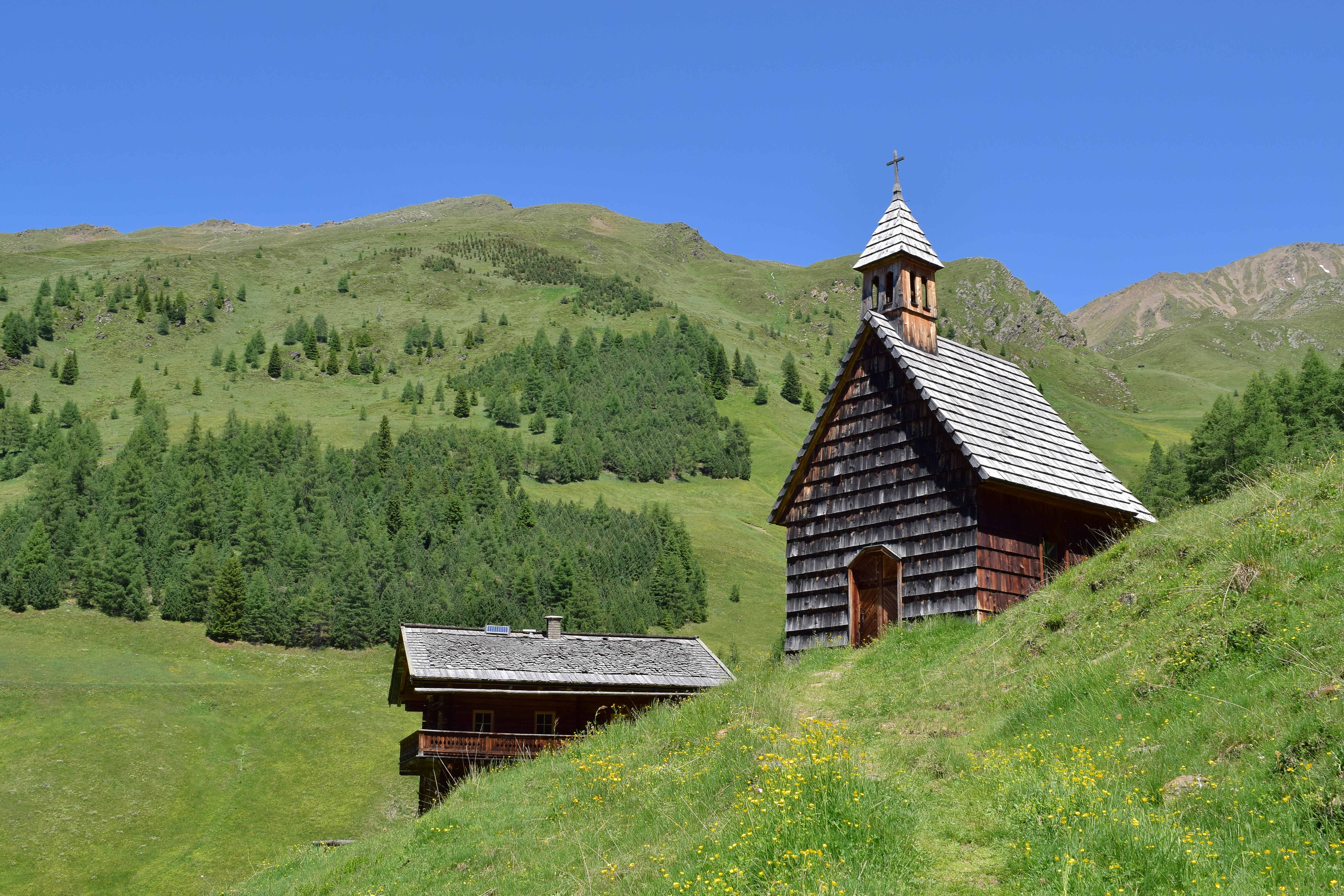 Die Fatima-Kapelle auf der Kamelisenalm wurde 1950 eingeweiht. Sie wurde von den acht Almhüttenbesitzern als Dank für die Heimkehr aus dem 2. Weltkrieg errichtet.